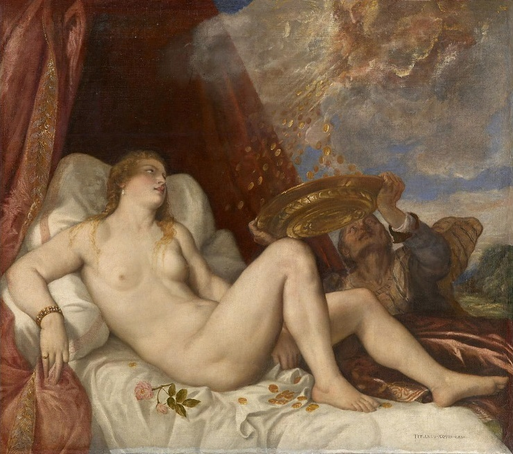 Danae